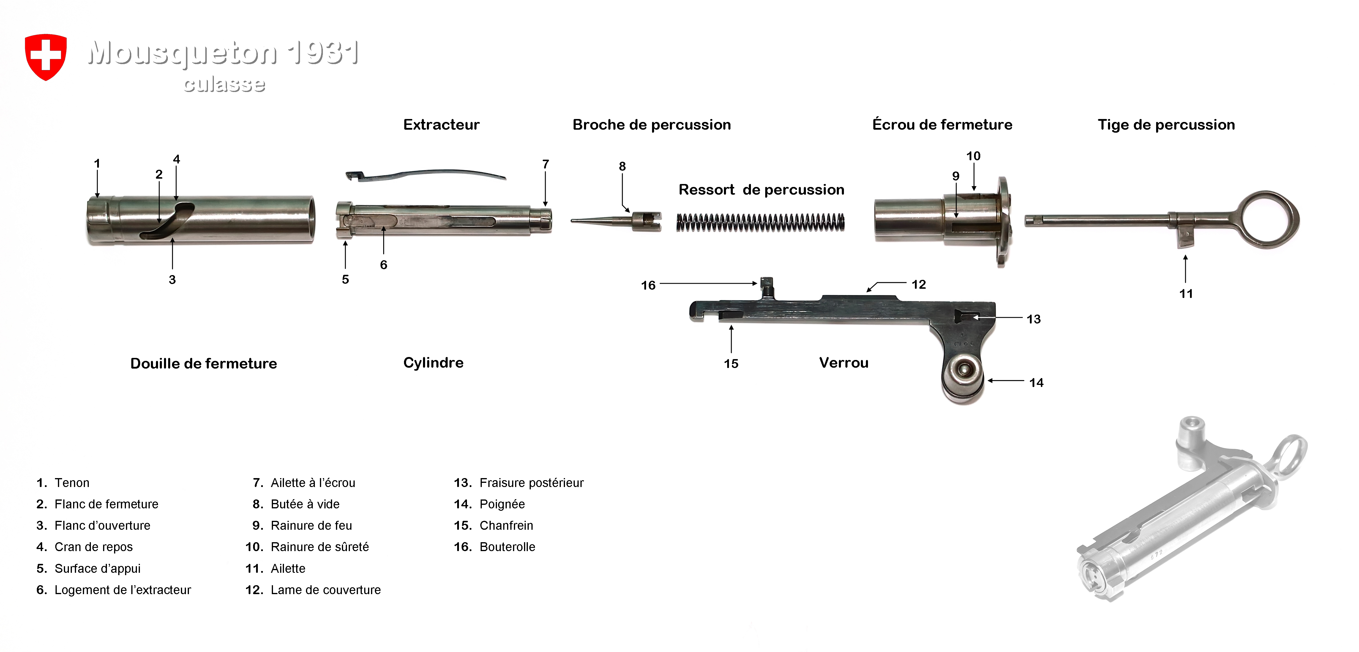 K31 culasse démontée